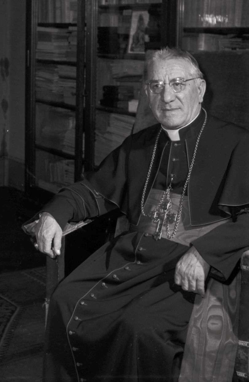 Pas de lieu. Septembre 1953. Vue des cardinaux Piazza et Saliège dans une bibliothèque.